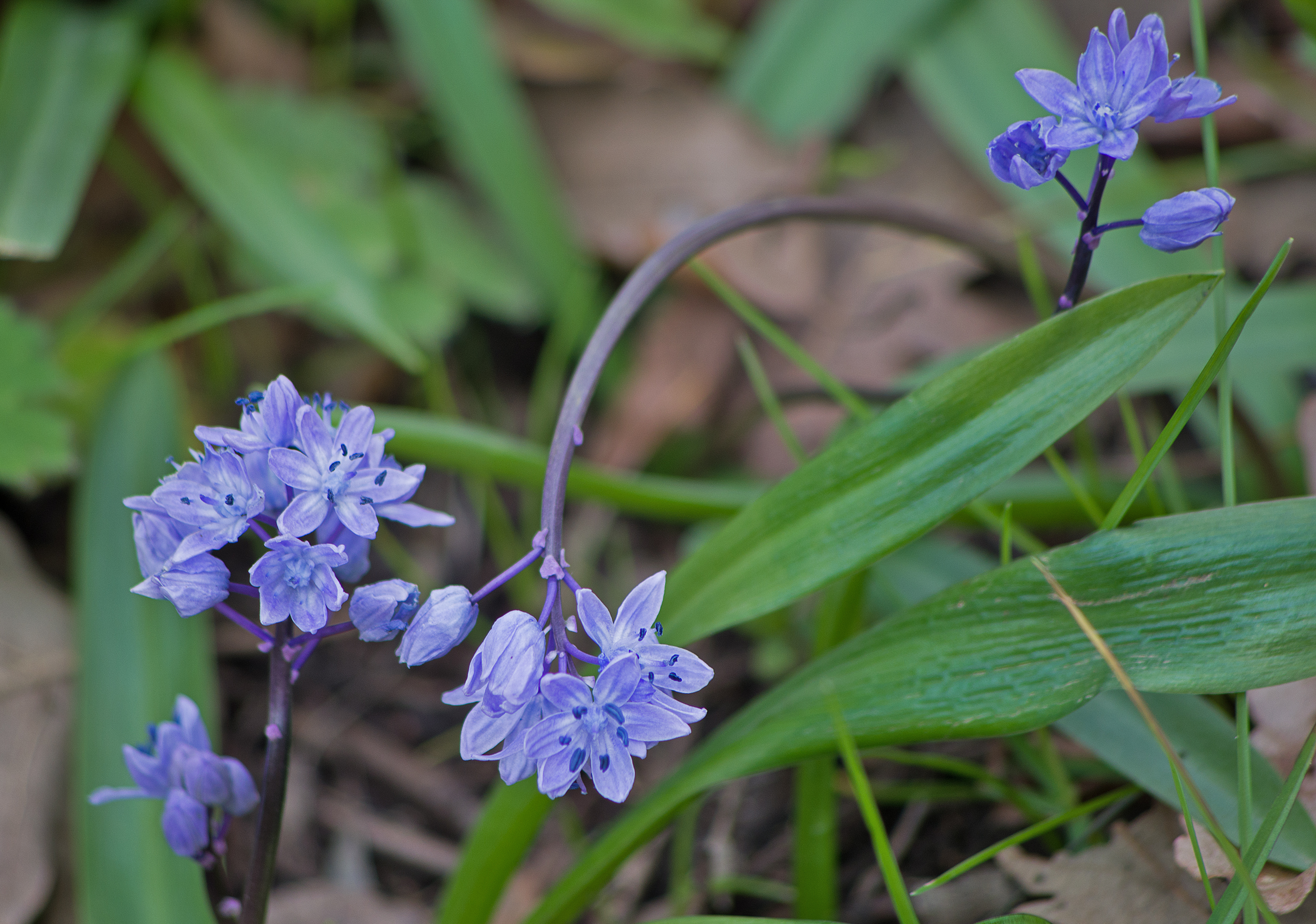 Беглик таш – Ропотамо, Битински синчец